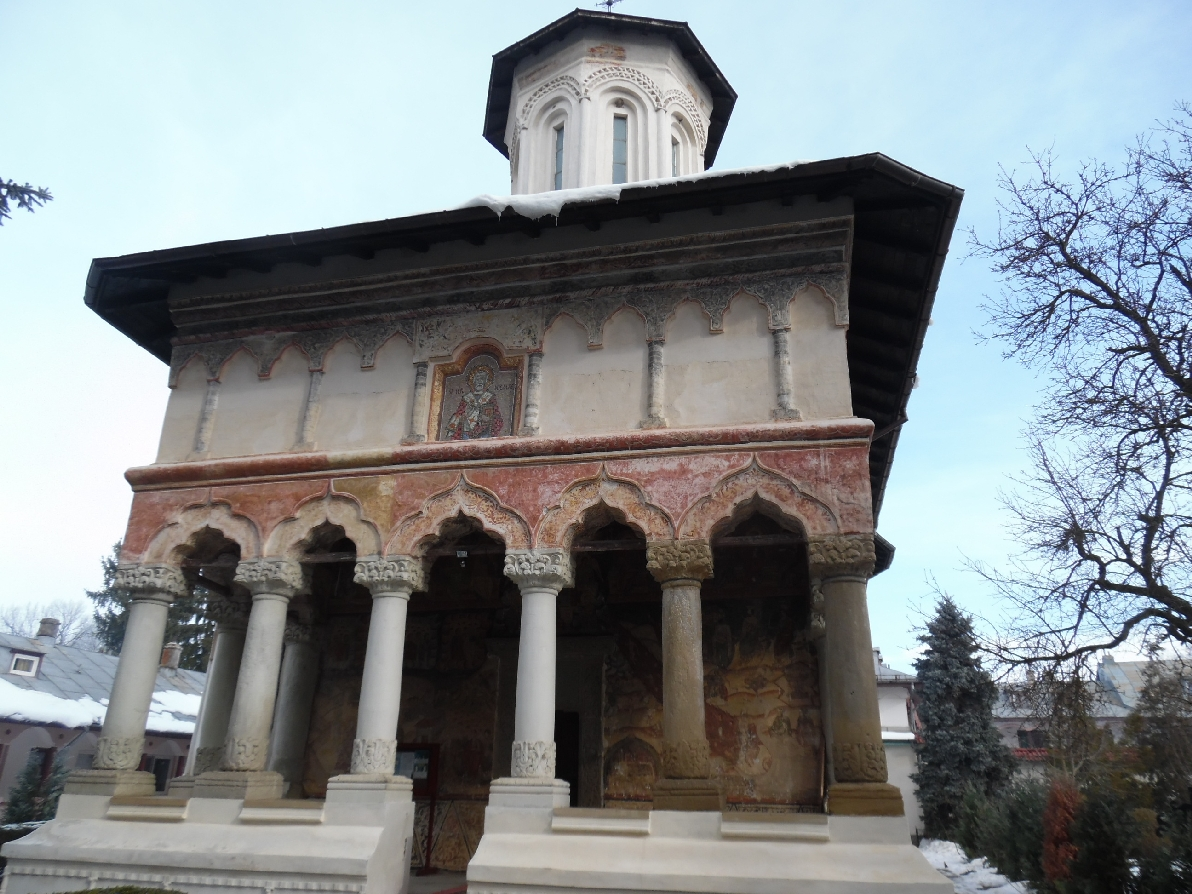 Manastirea Sitaru Balamuci